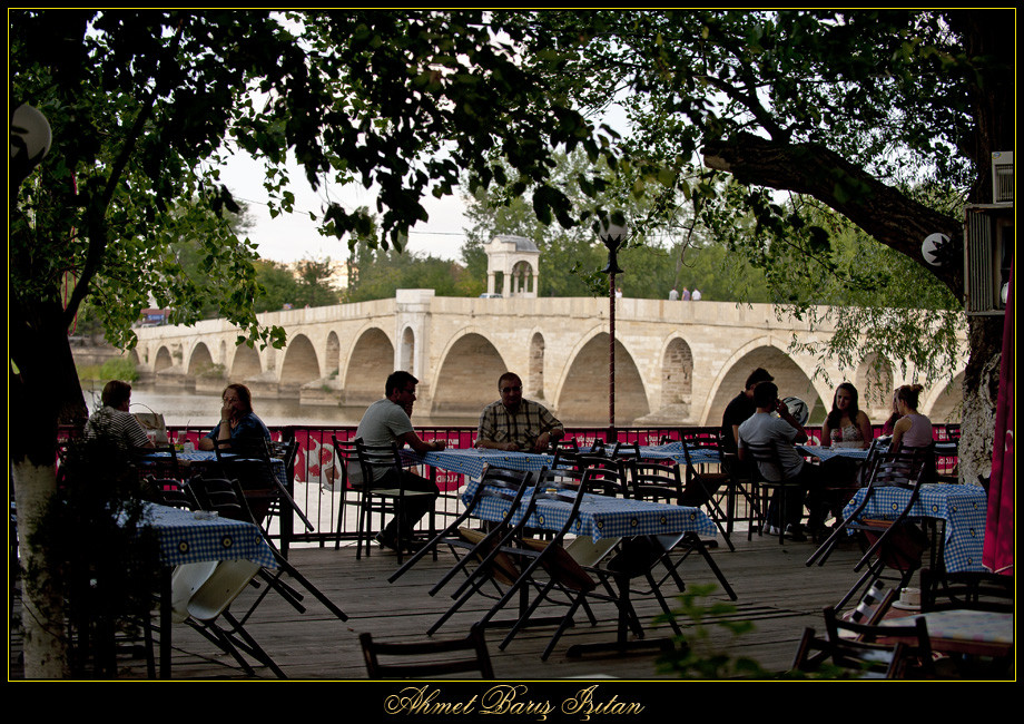 Karaağaç yakınlarındaki çay bahçelerinden Meriç Nehri ve Köprü